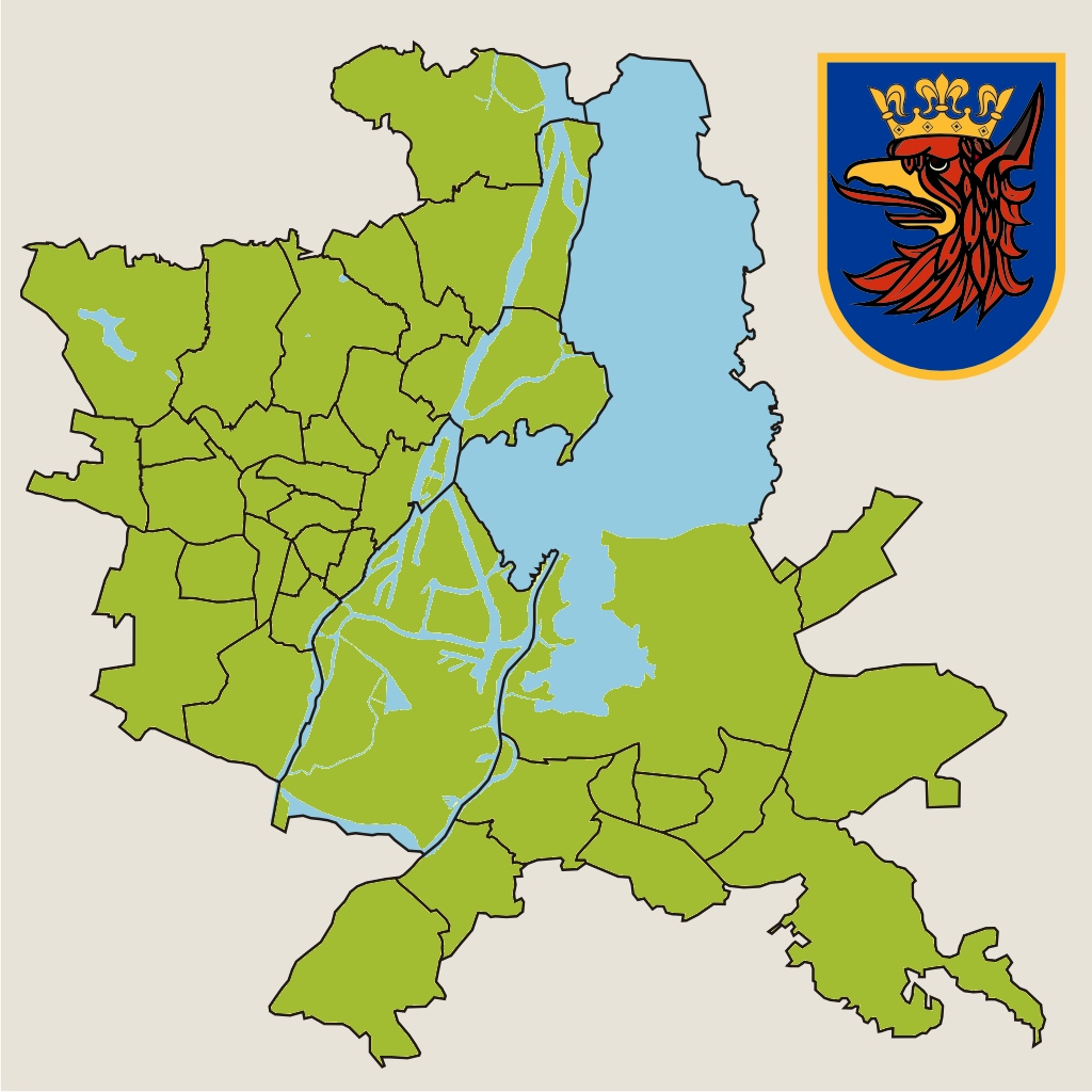 Podział Szczecina na jednostki pomocnicze miasta w 2010 roku